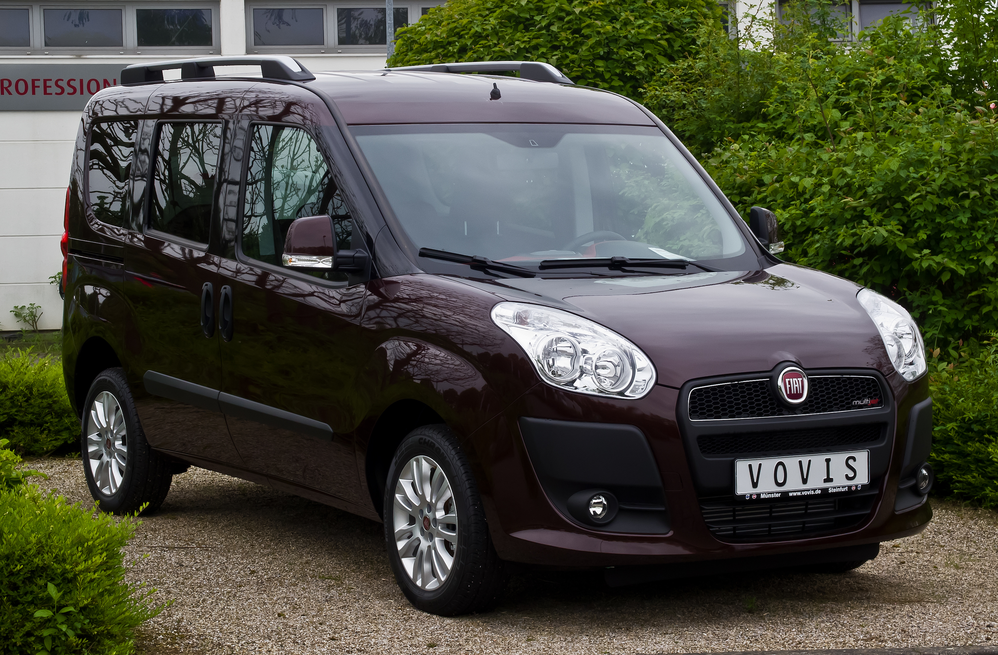 Fiat Doblò 2.0 16V Multijet Easy (II)